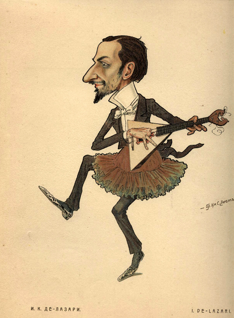 Карикатура на Ивана де Лазари